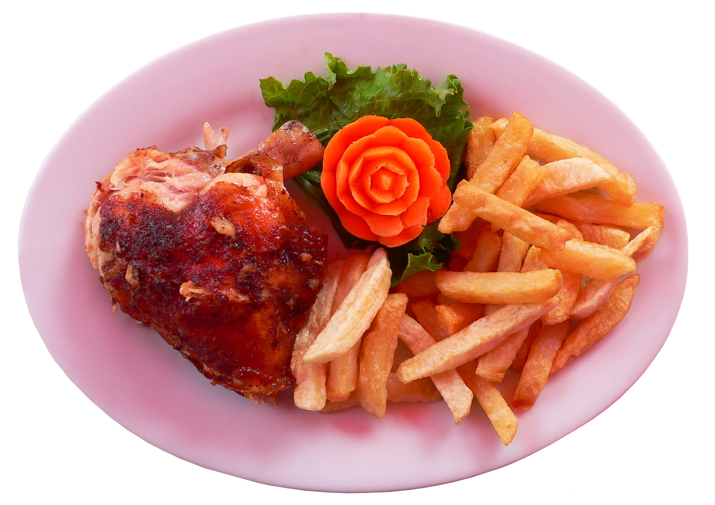 Pollo a la brasa peruano. Foto tomada por Manuel González Olaechea y Franco